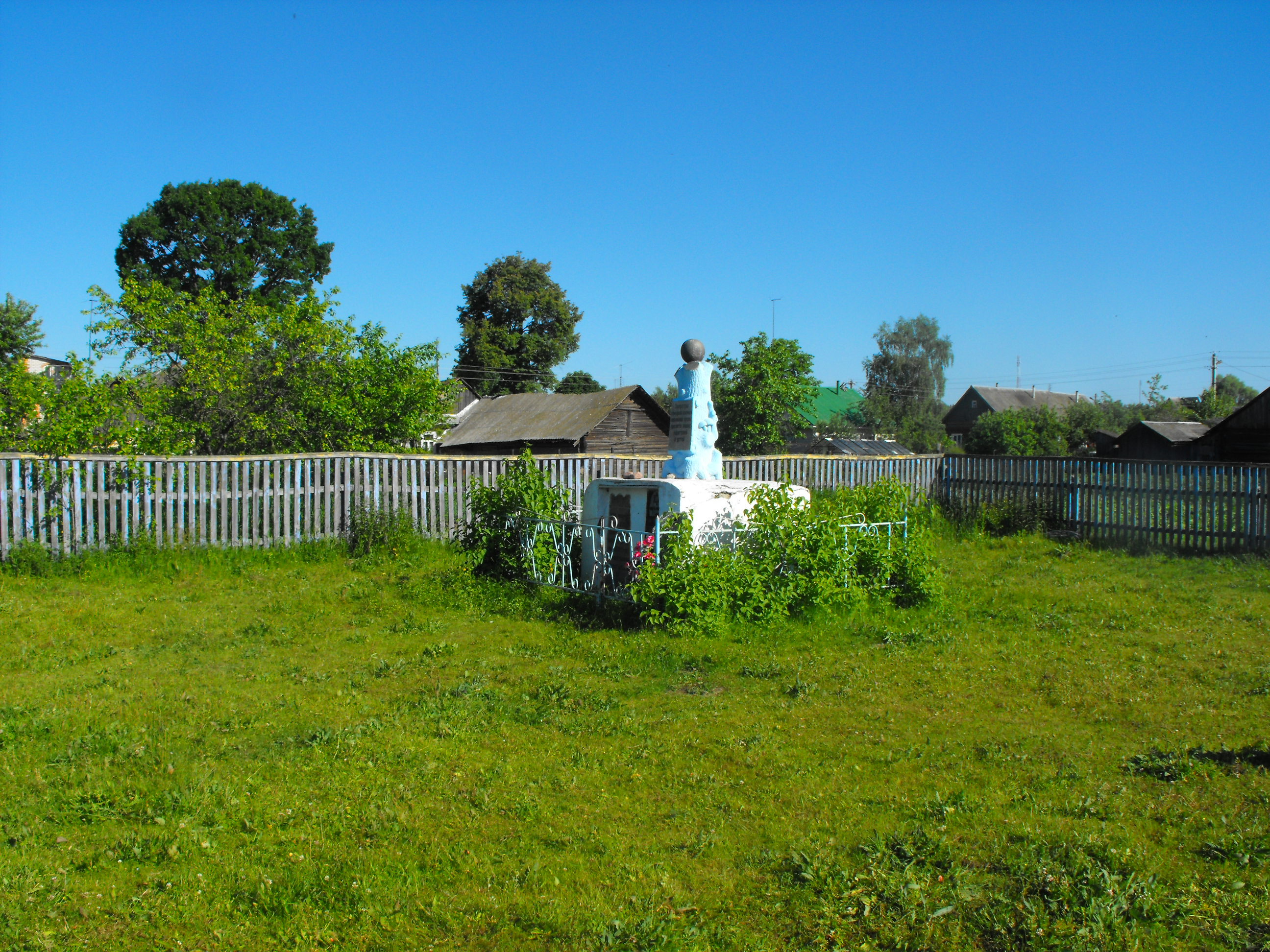 Памятник евреям Ракова, сожжёным нацистами в синагоге 4 февраля 1942 года. Проход - на Красноармейском переулке между домами №№ 1 и 3.